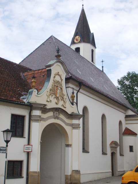 Eingang zum Schloss Oberkirchberg und zur Kirche St. Sebastian, Oberkirchberg, Gemeinde Illerkirchberg, Alb-Donau-Kreis